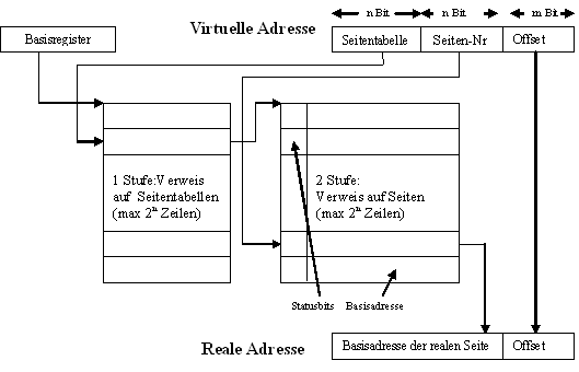 Schematische Darstellung der mehrstufigen Umsetzung einer Virtuellen Adresse in eine reale Speicheradresse. Dargestellt ist die zweistufige Umsetzung